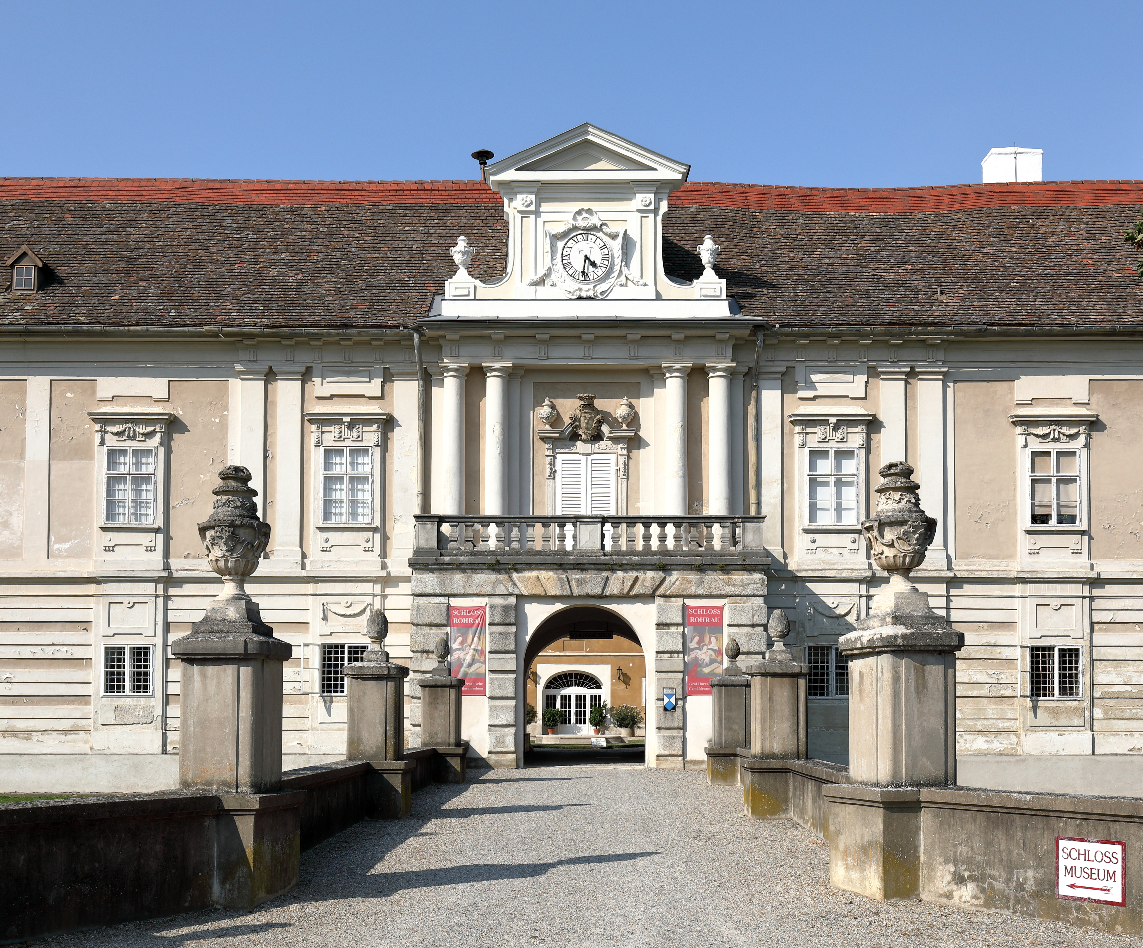 Portal des Schlosses Harrach in der niederösterreichische Marktgemeinde Rohrau.Das Schloss ist seit 1542 im Besitz der Grafen Harrach. Im 16. Jahrhundert erfolgte der Ausbau der mittelalterlichen Grenzburg zu einem Wasserschloss. Umbauten erfolgten 1688 sowie 1722 und 1776/77 erhielt das Schloss im Wesentlichen sein heutiges Erscheinungsbild.